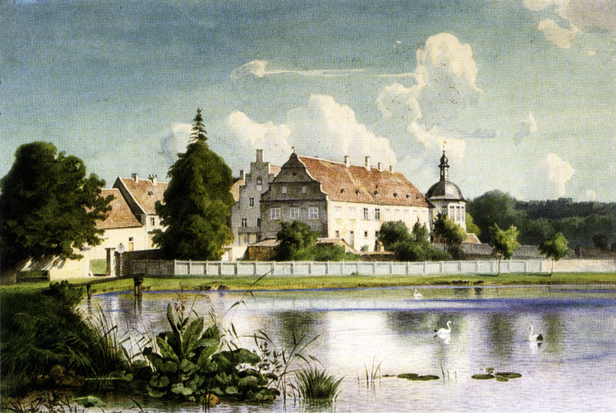 Schloss Kranichstein, 1852